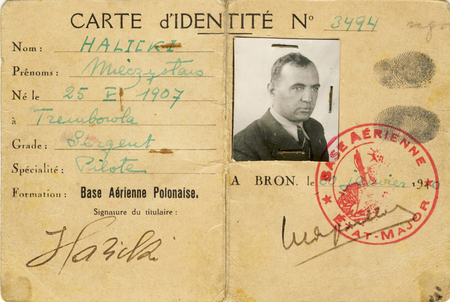 Francuska legitymacja pilota Mieczysława Halickiego